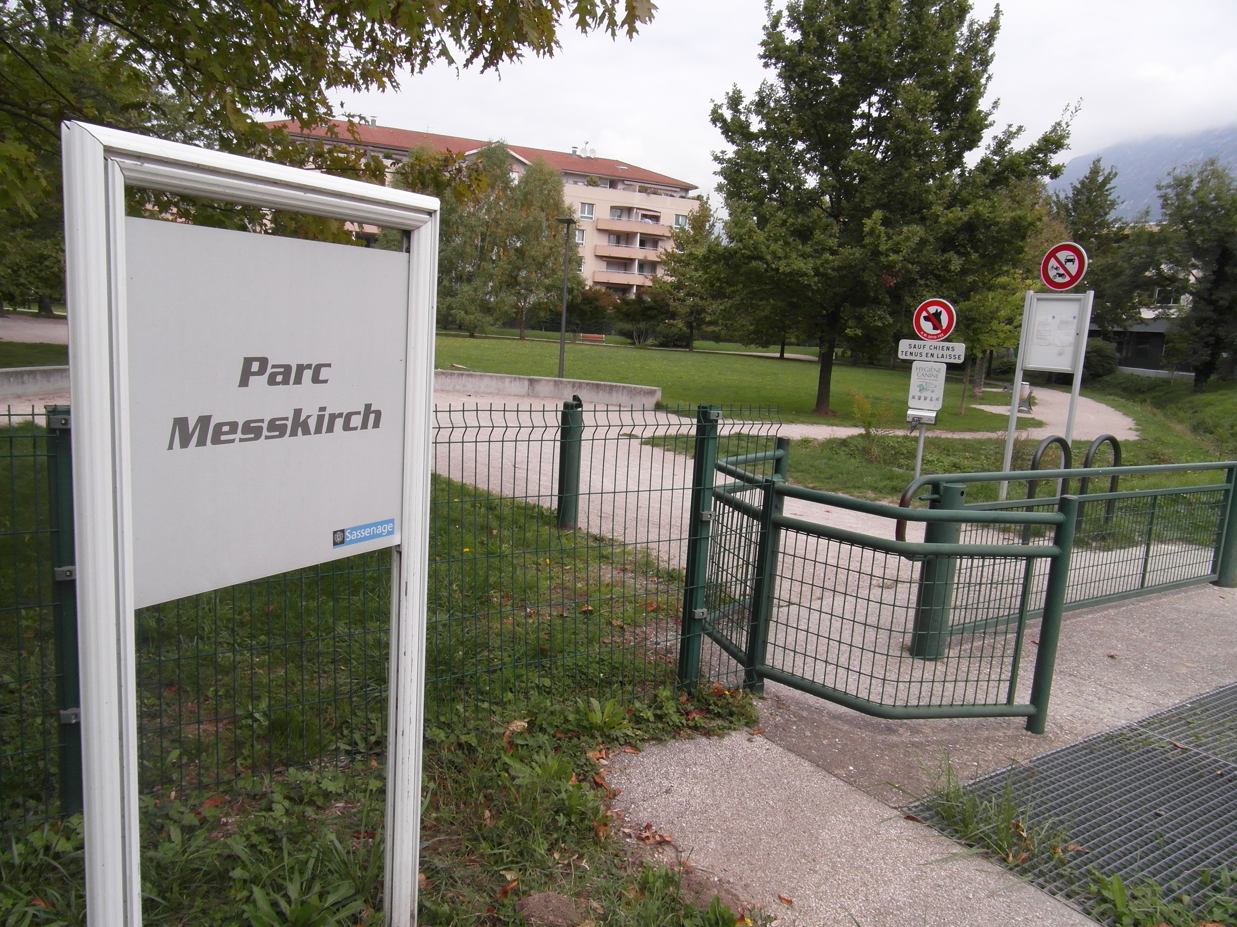 Square Messkirch à Sassenage